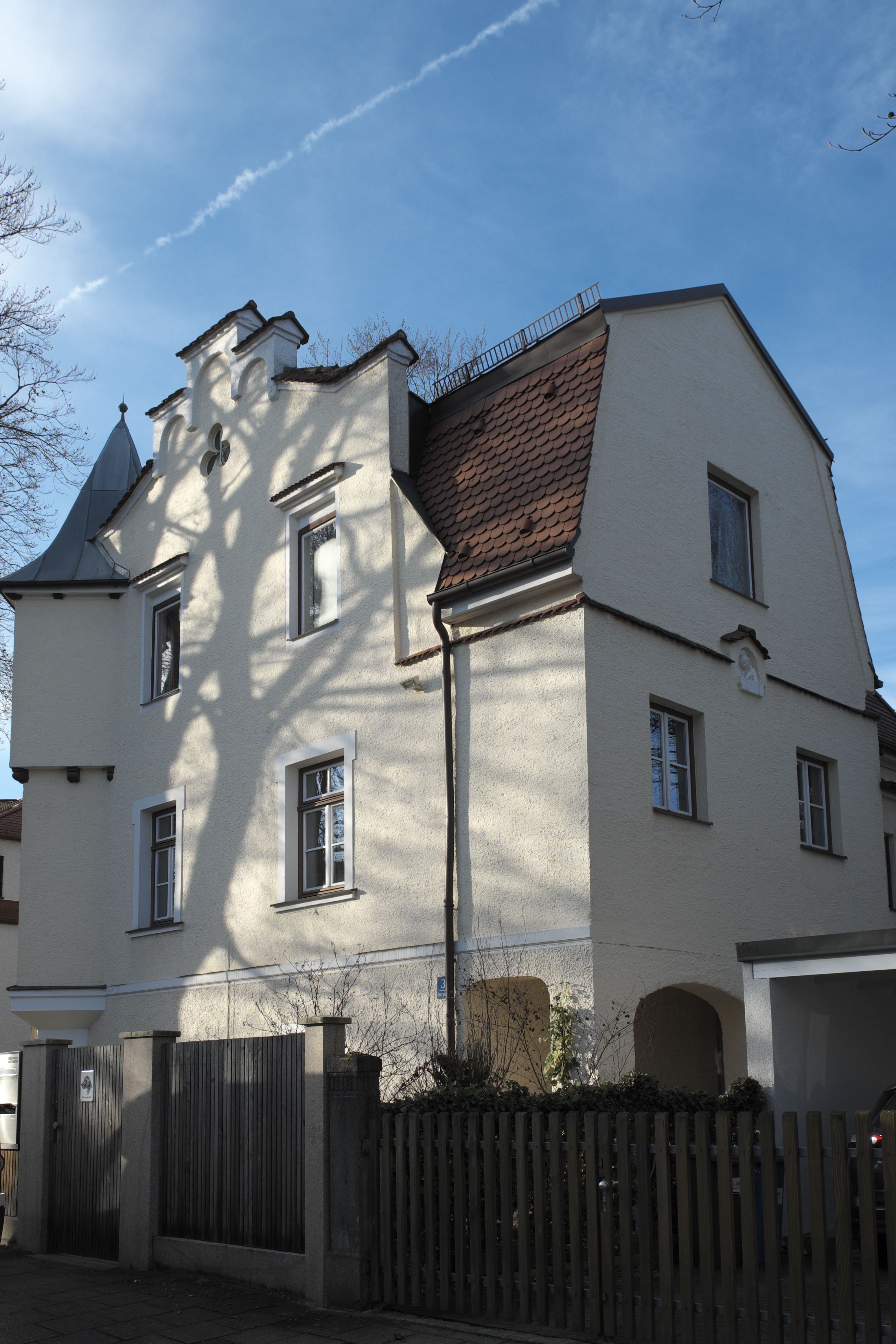 Villa in der Barystraße 3 in Obermenzing im Stadtbezirk Pasing-Obermenzing in München (Bayern/Deutschland), 1902 von Johann Schalk erbaut